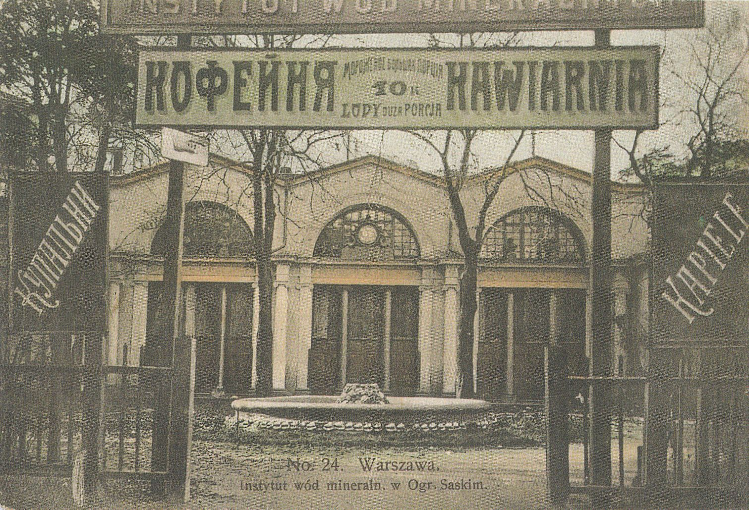 Instytut wód Mineralnych w Ogrodzie Saskim